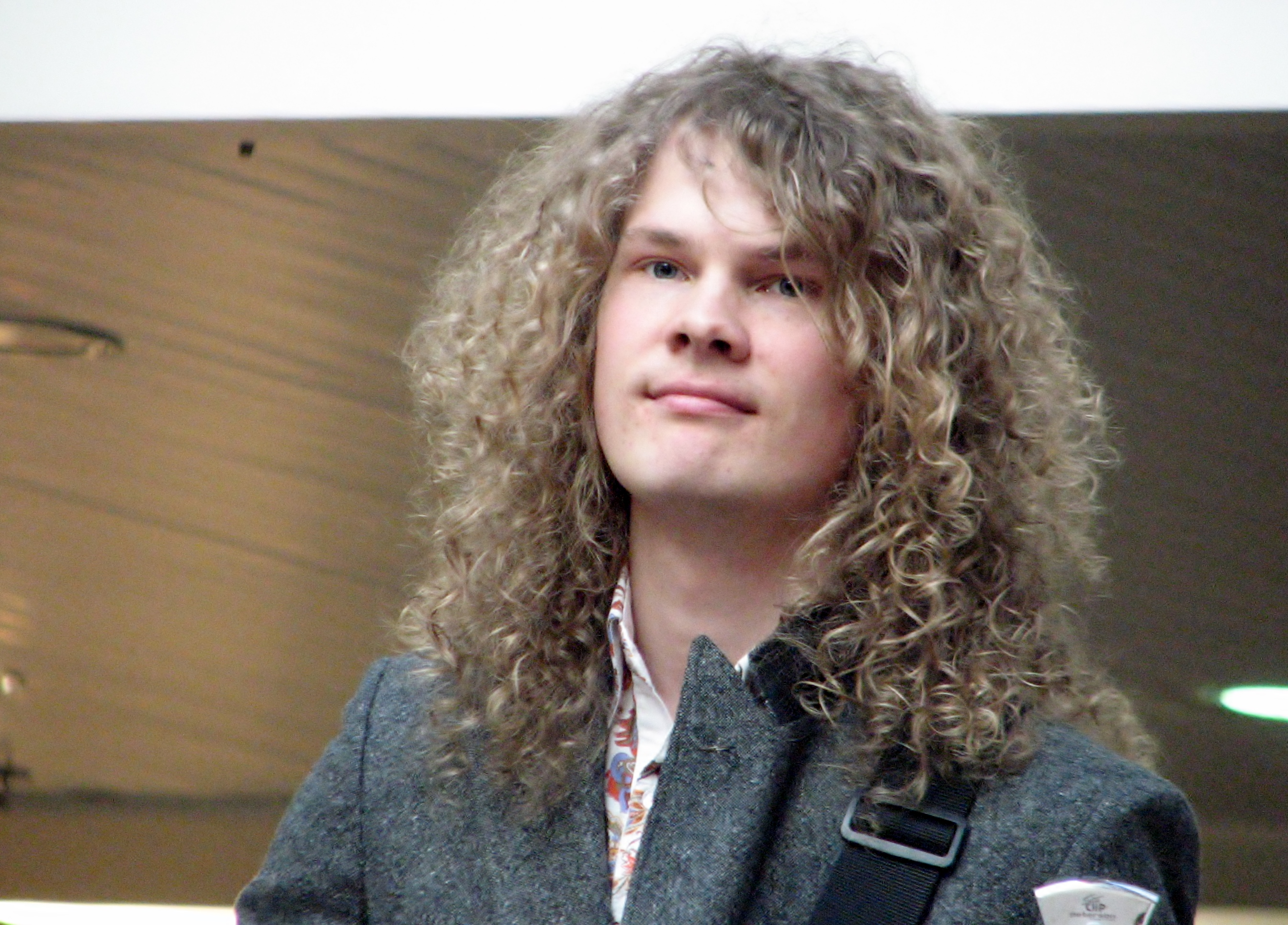 Villu Talsi esinemas ansambli Curly Strings koosseisus Tallinn Music Weekil